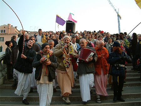 Slika je bila narejena zmojim fotoaparatom v Benetkah, na karnevalu.